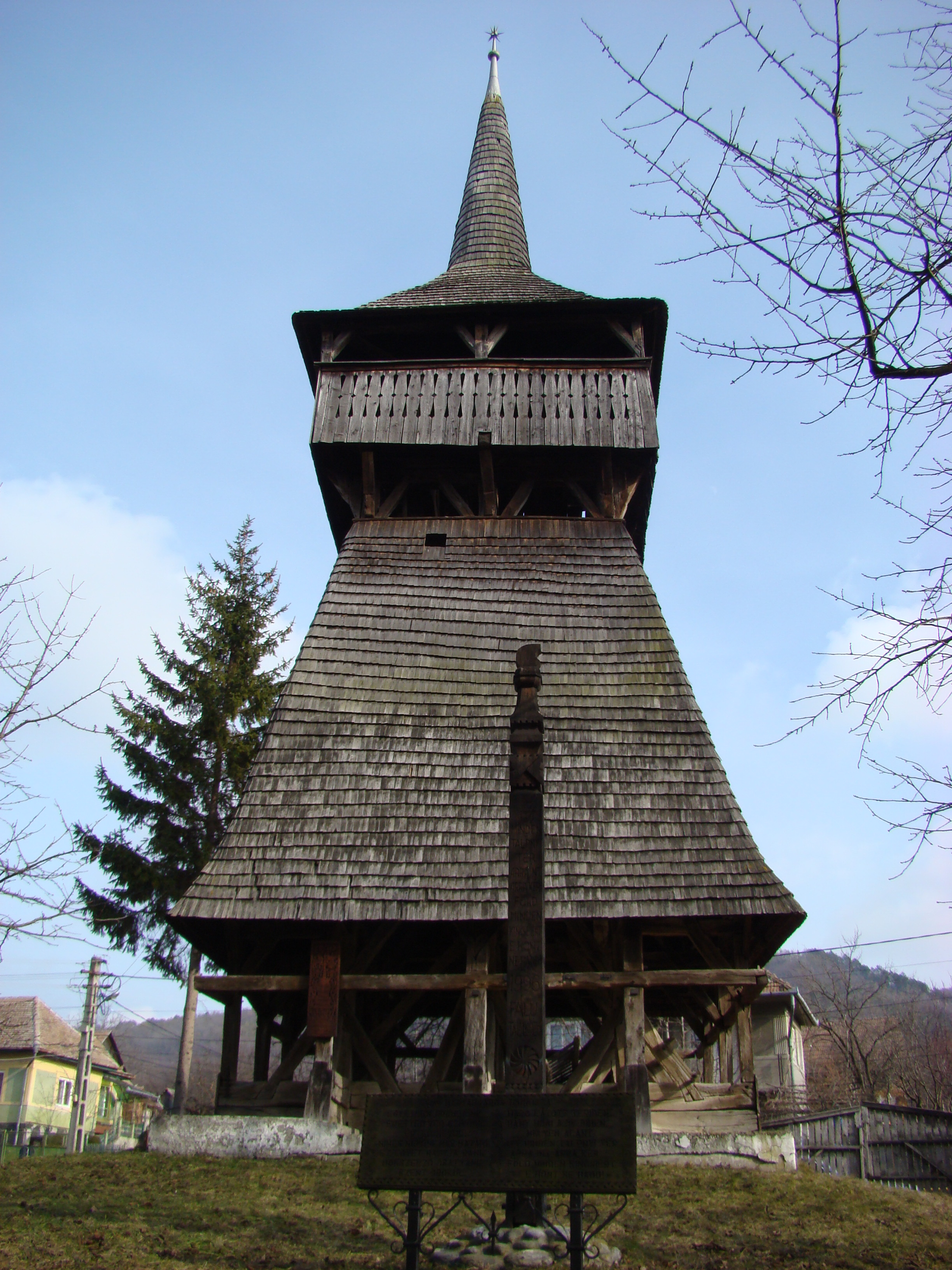 Clopotniţa de lemn a bisericii unitariene, sat DELENII; comuna BĂGACIU